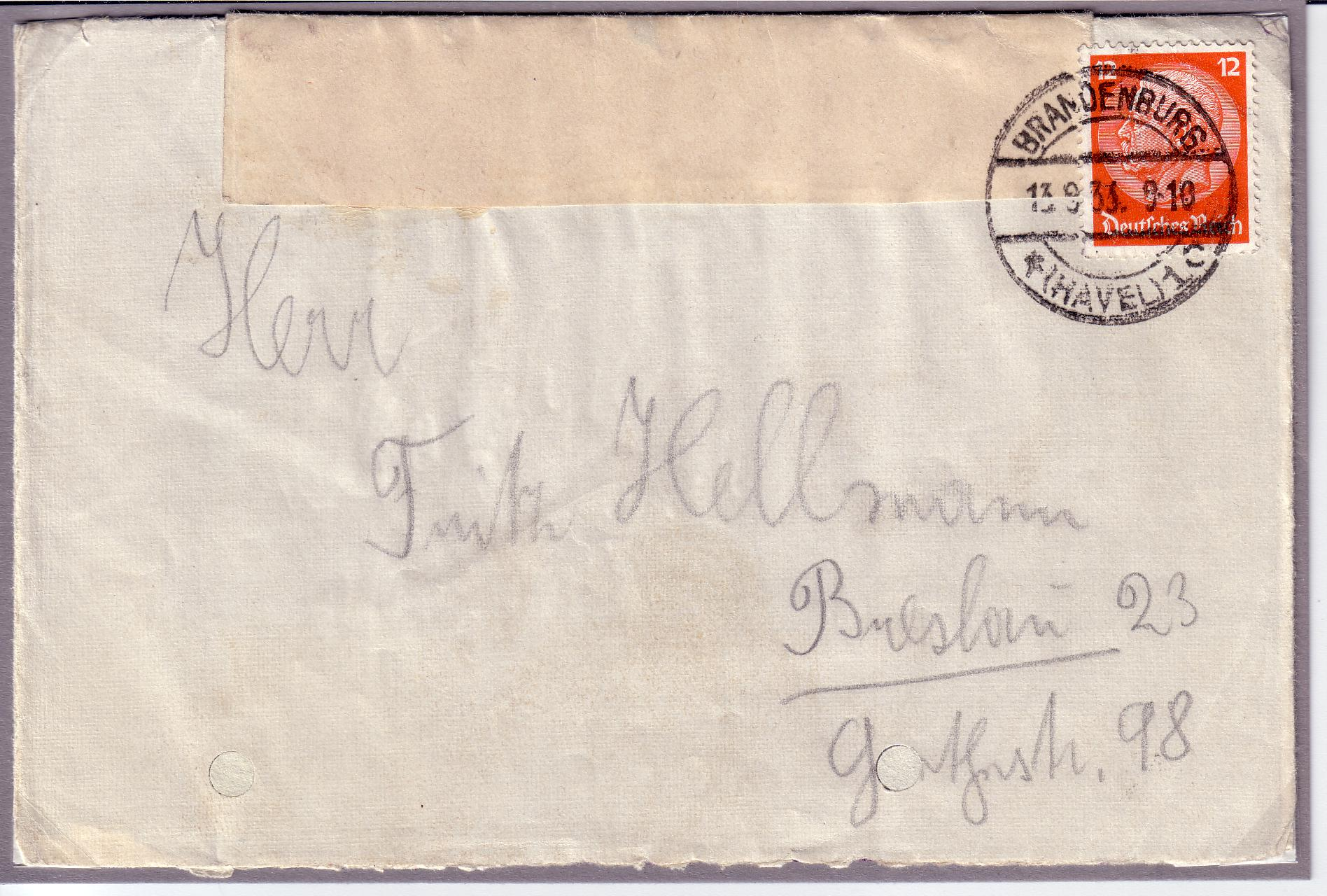 Brief des Lagerkommandanten aus dem KZ Brandenburg vom September 1933 Poststempel: "Brandenburg ((Havel)1) vom 13.9.1933